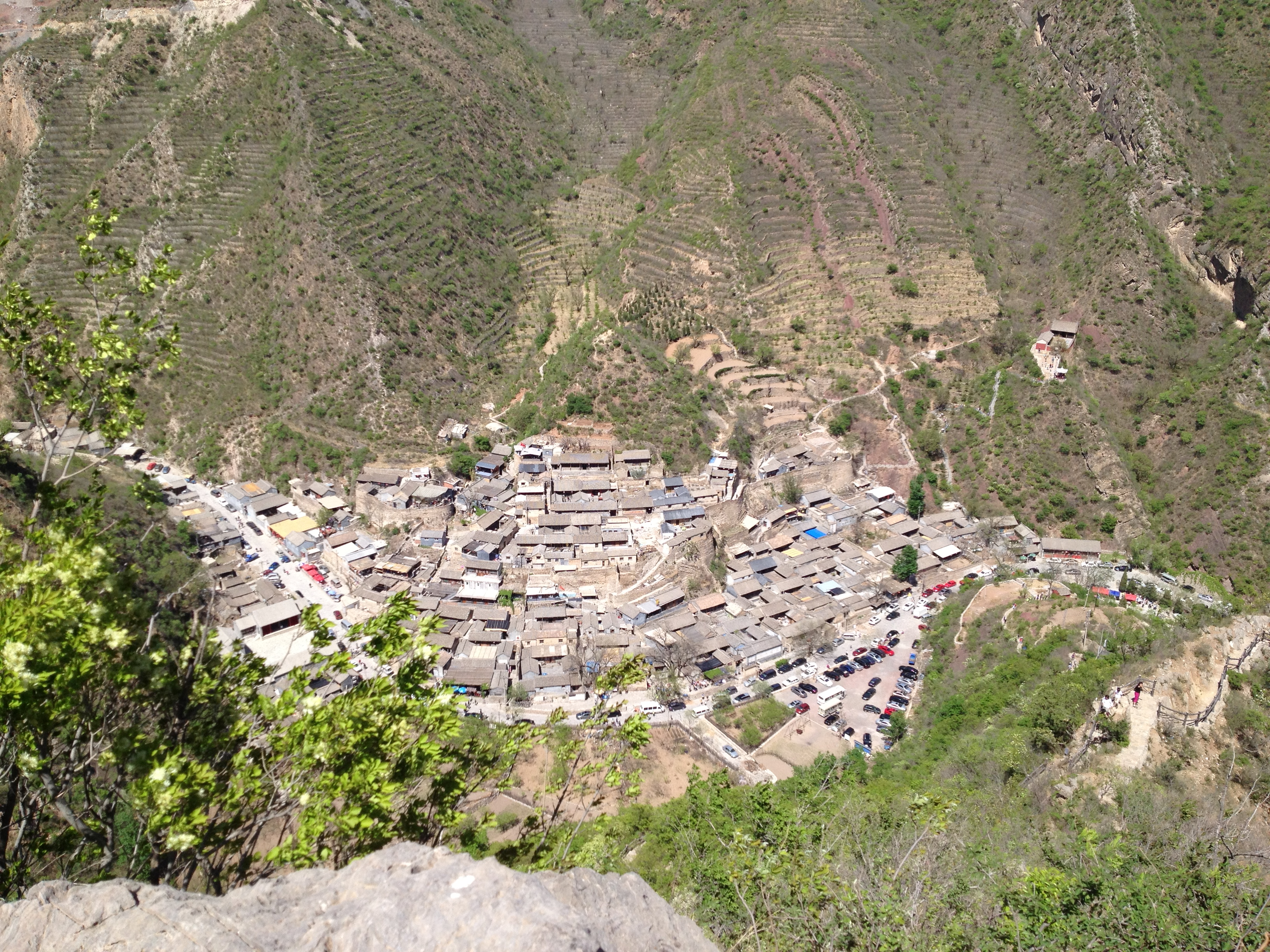 中文（中国大陆）: 北京西郊门头沟区斋堂镇爨底下村